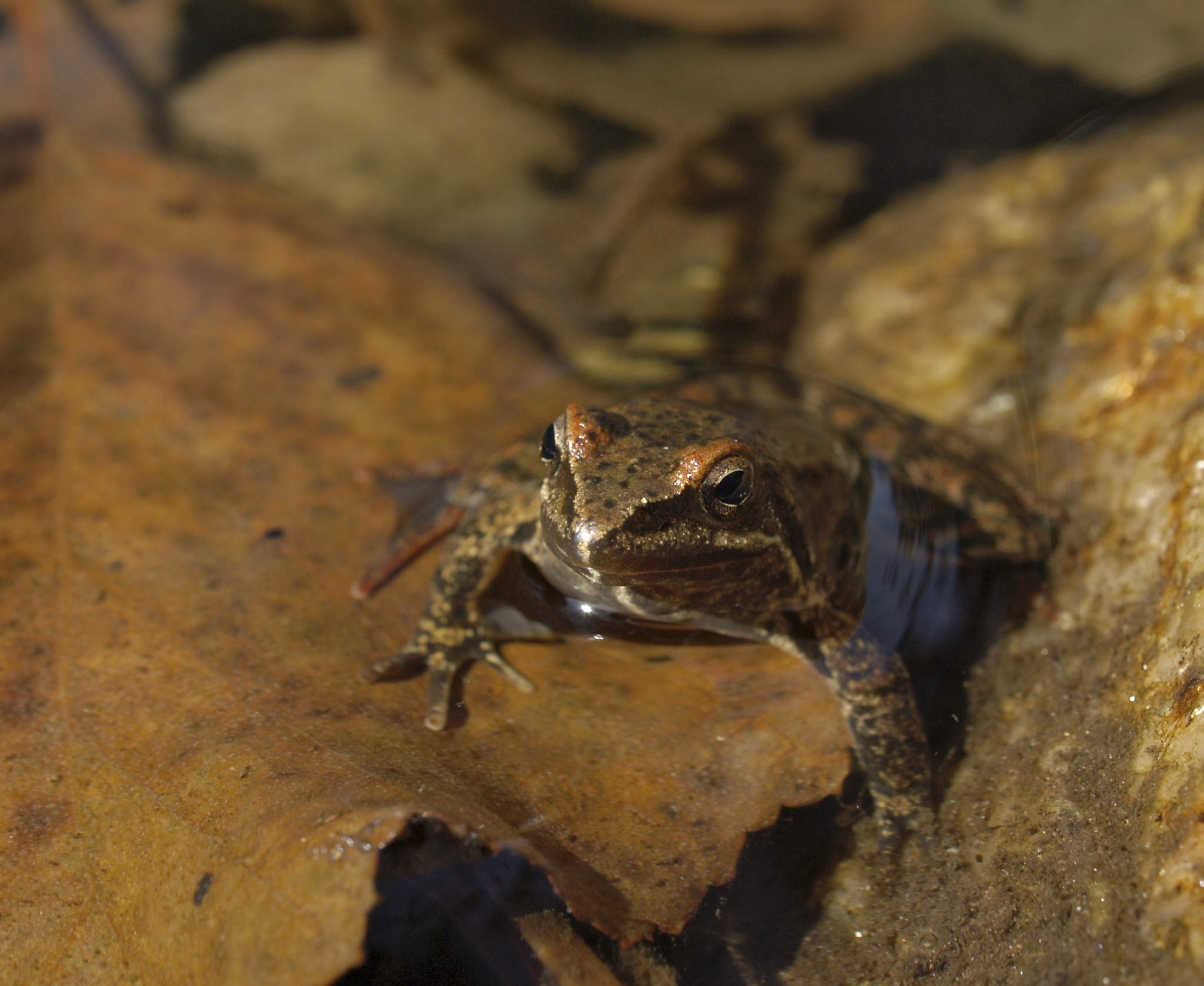 Ejemplar juvenil de rana patilarga (Rana iberica). Garganta del Vadillo, Losar de la Vera (Cáceres, España). 11-noviembre-2007.